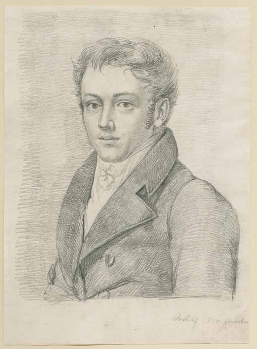 Selbstporträt